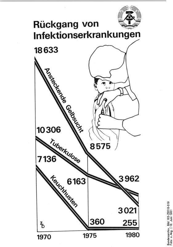 Infografik, Rückgang von Infektionskrankheiten in der DDR ADN-ZB Grafik 18.6.81 – Rückgang von Infektionskrankheiten in der DDR – Wie unsere Grafik zeigt ist es durch die zielgerichtete Gesundheitspolitik der DDR gelungen, bei Infektionskrankheiten einen entscheidenden Rückgang zu erreichen. Seit 1963 ist in der DDR kein Fall von Kinderlähmung mehr aufgetreten und seit 1974 kein Fall von Diphtherie.